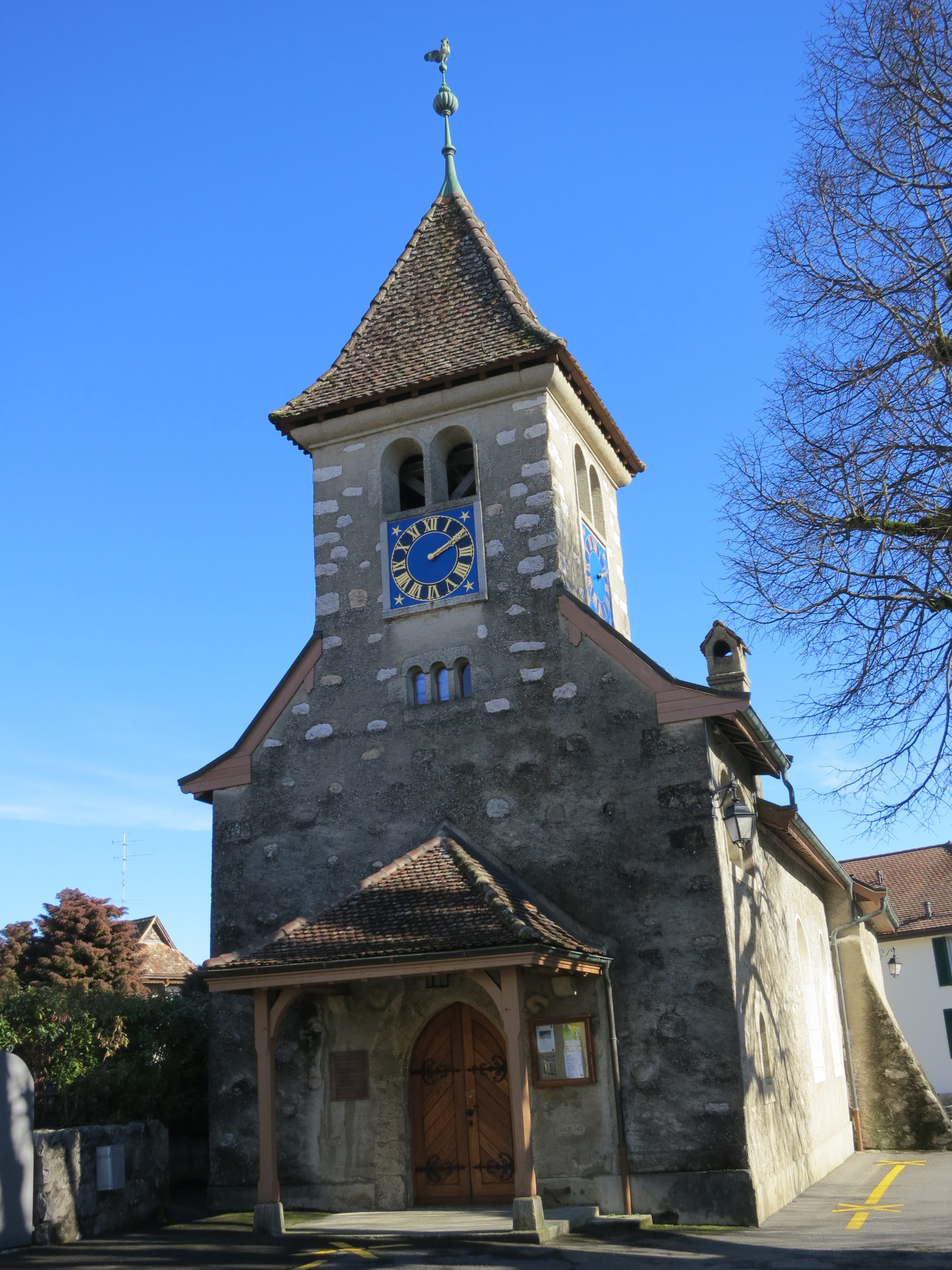 Kirche, Vich VD, Schweiz